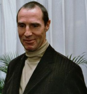 Frank Ullrich, Bundestrainer des DSV-Herren Biathlon Teams